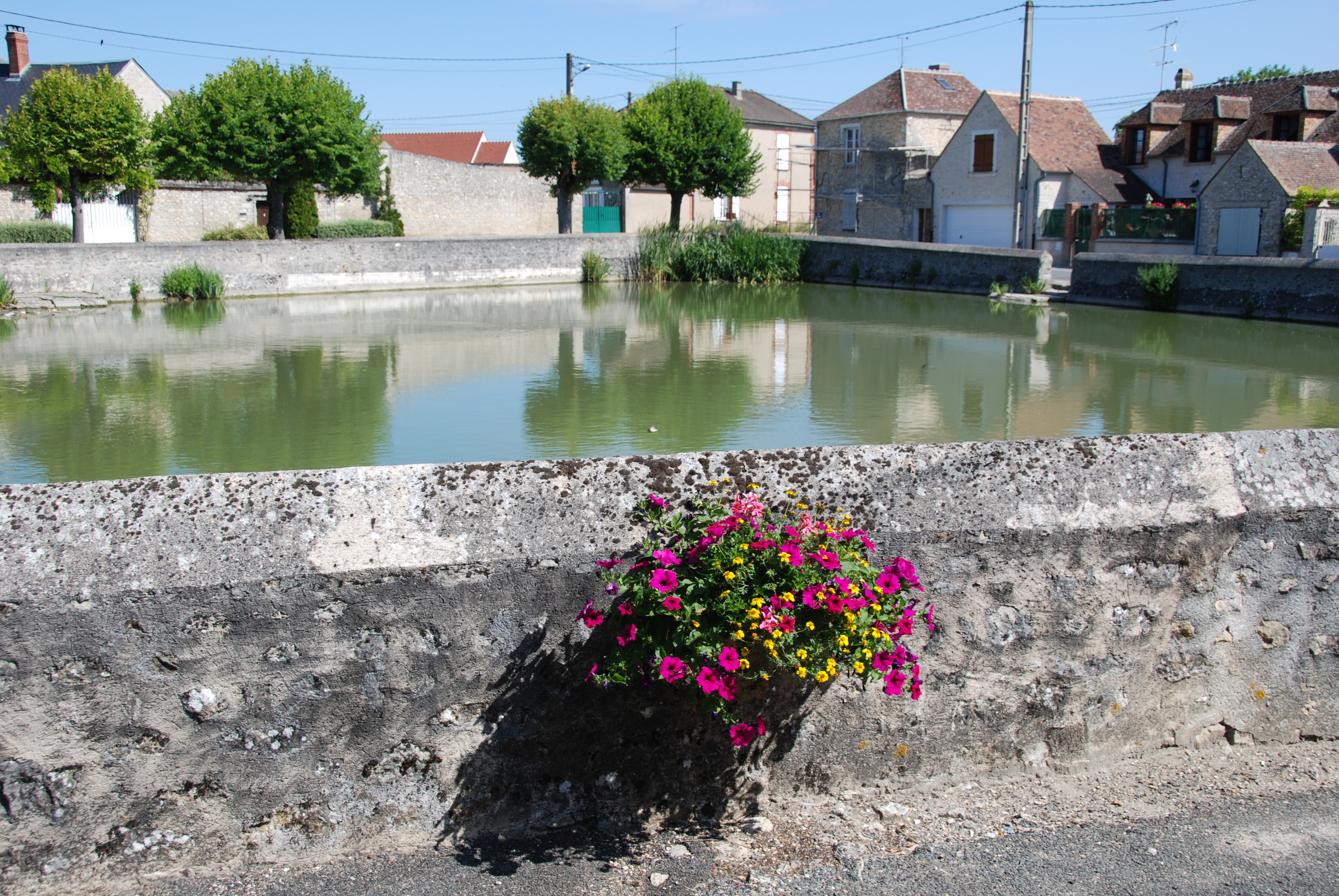 Oeuvre personnelle dans le cadre du recencement du petit patrimoine rural